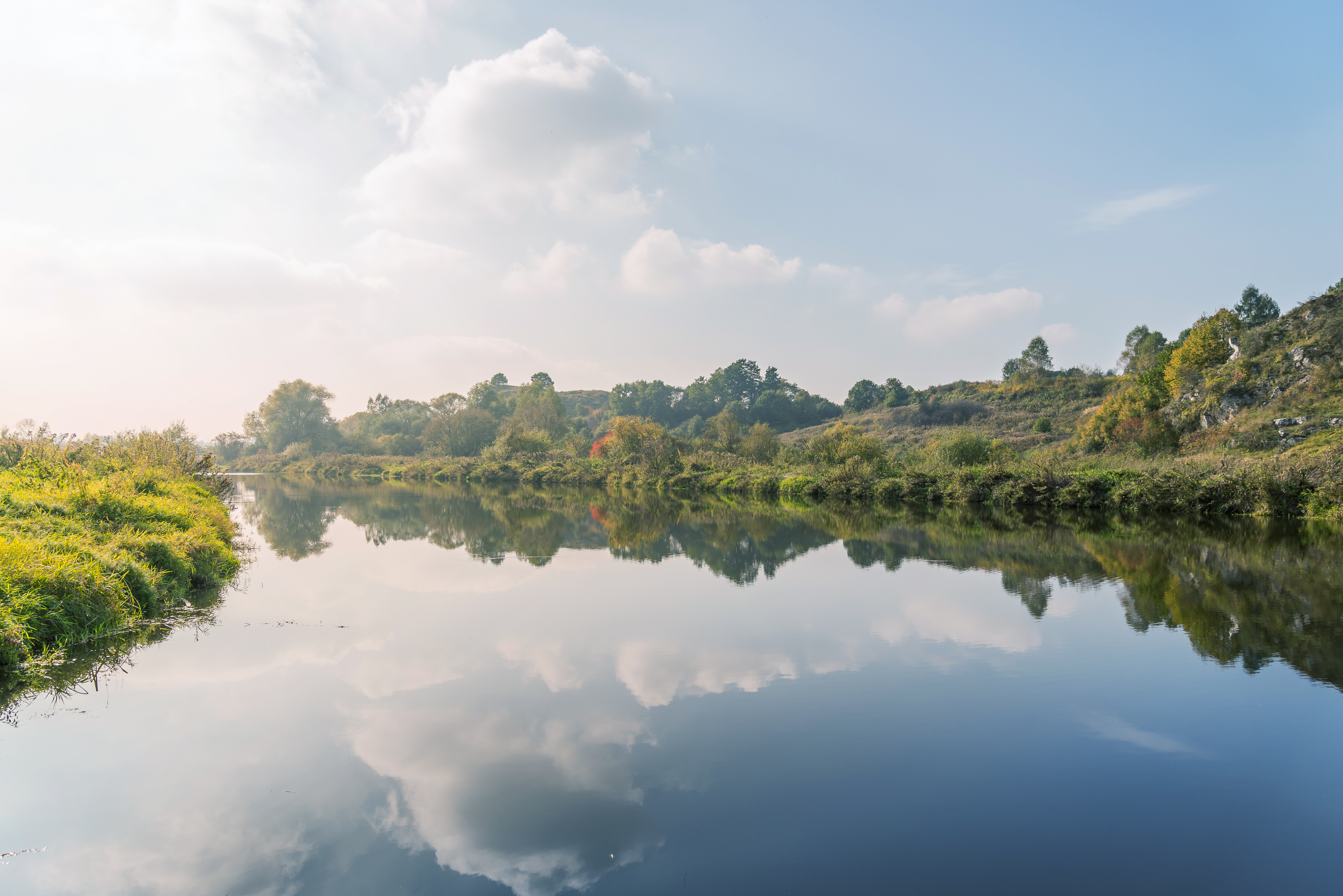 Park krajobrazowy Bielańsko-Tyniecki Park Krajobrazowy.